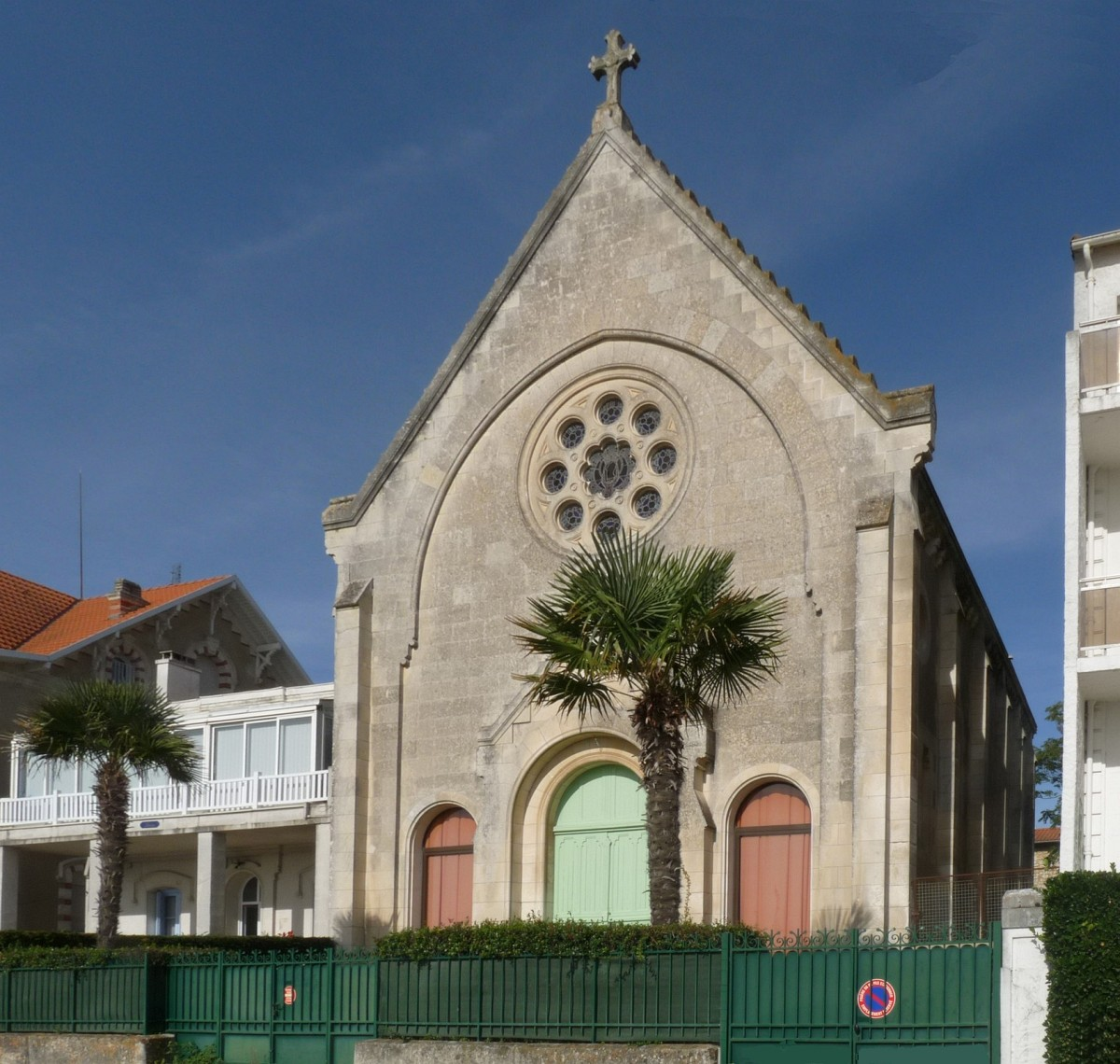 chapelle de Pontaillac, Vaux-sur-Mer, Charente-Maritime, France